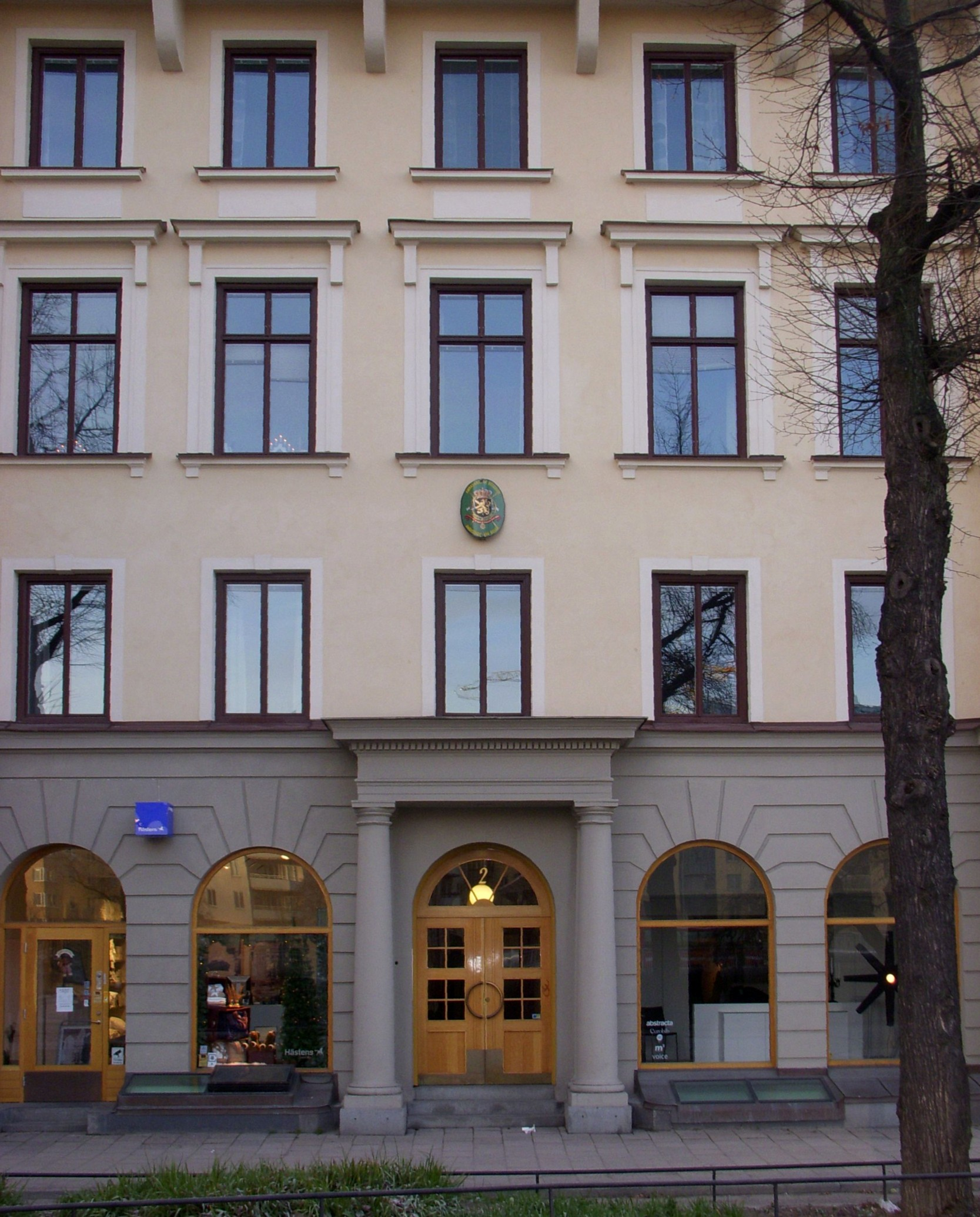 Belgiens ambassad i Stockholm